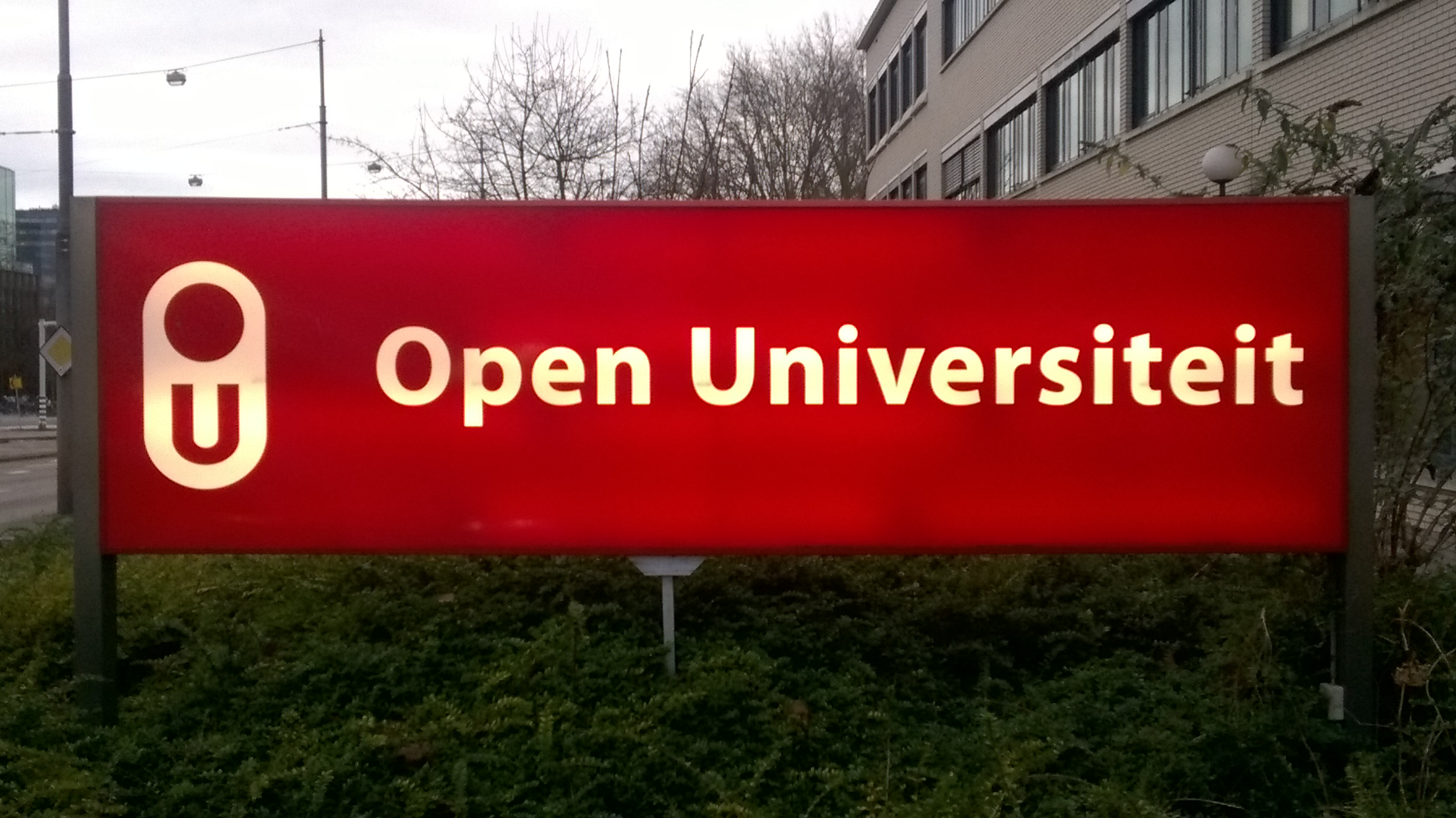 Logo en bord van de Open Universiteit. Bord is van binnen verlicht met lampen. Foto genomen vanaf de stoep voor de ingang van Studiecentrum Amsterdam aan de Amstelveenseweg 390.